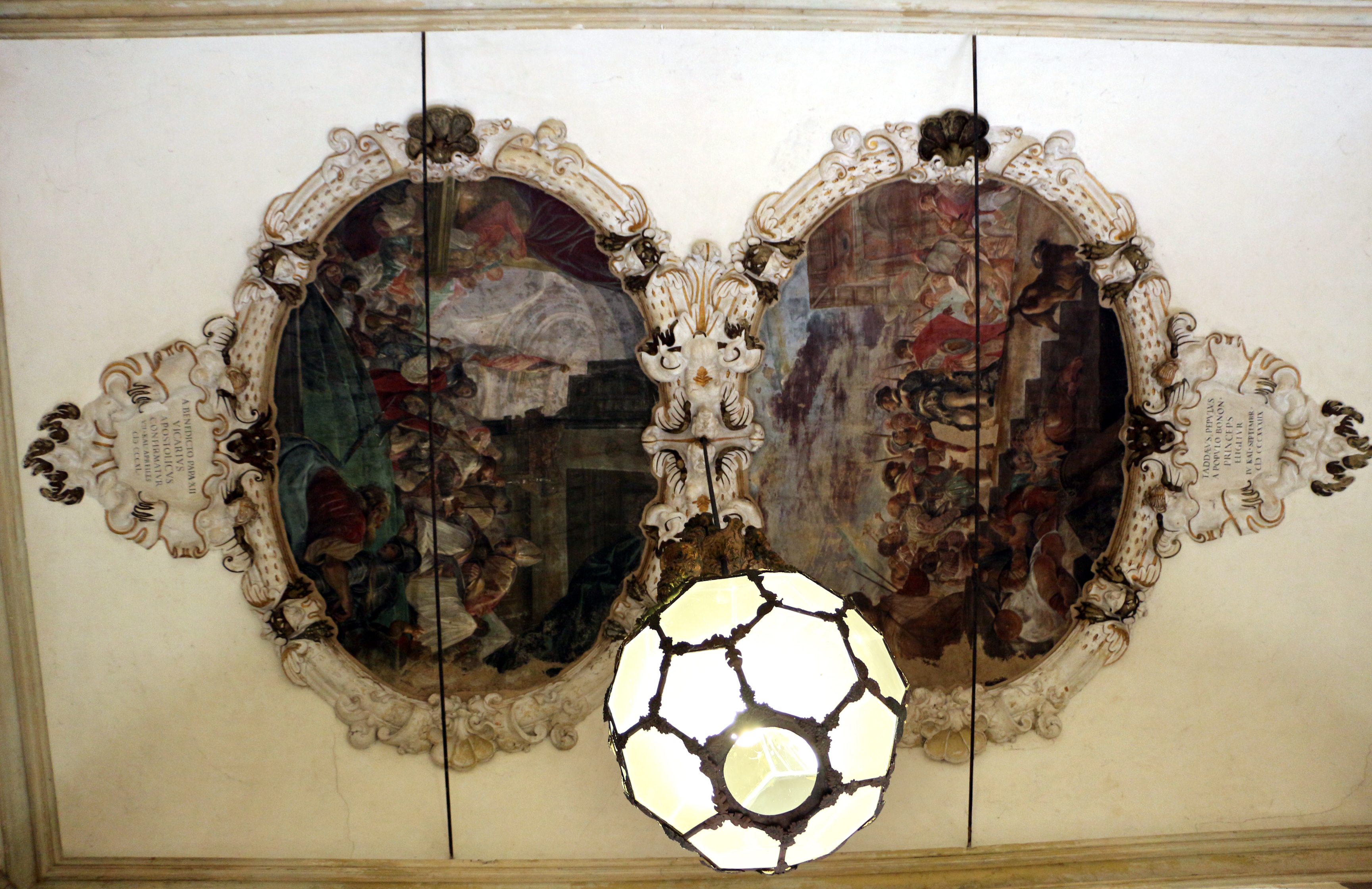 Pinacoteca Nazionale di Bologna in Palazzo Pepoli Campogrande This is a photo of a monument which is part of cultural heritage of Italy.